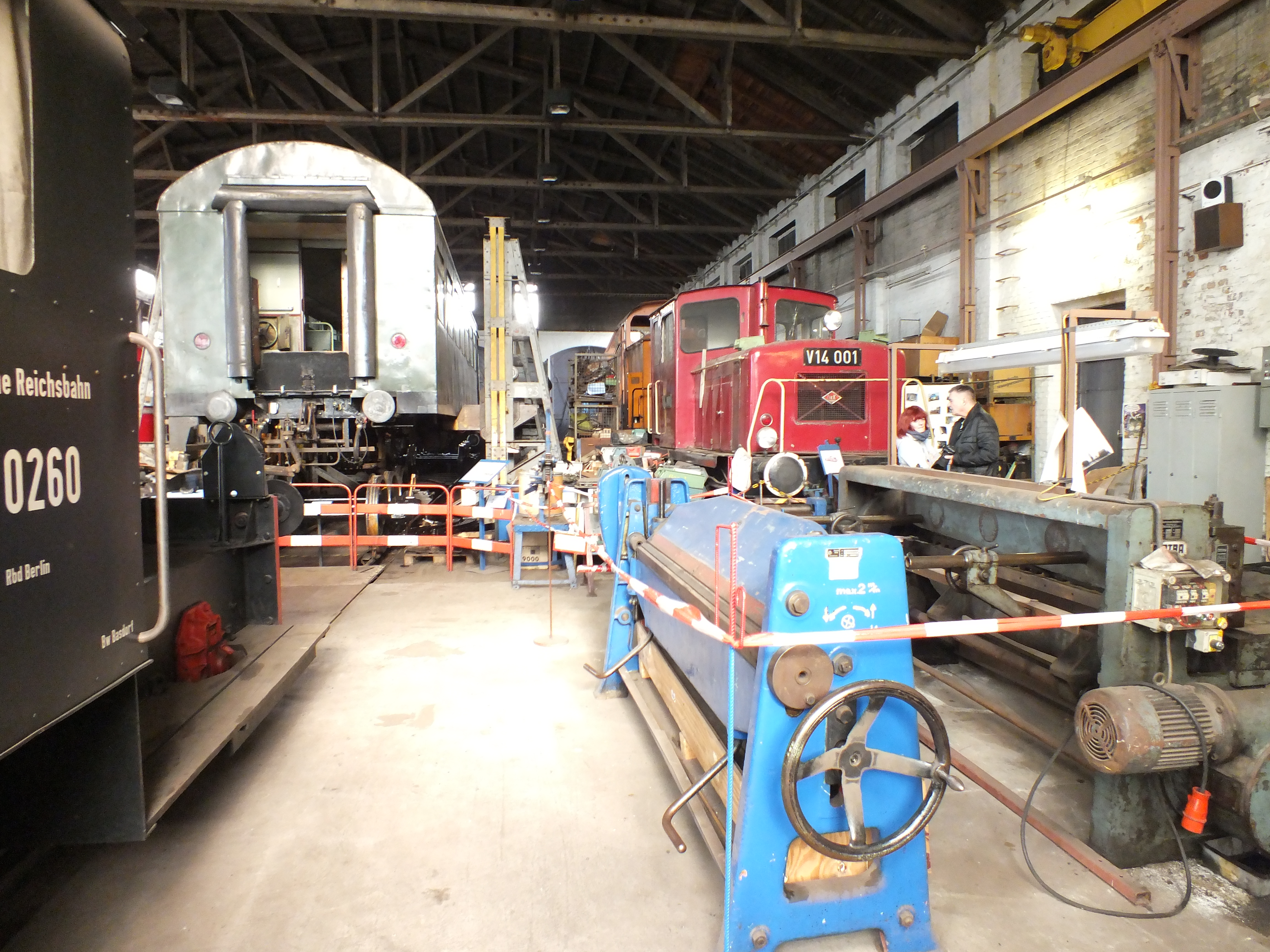 Heidekrautbahn, Museumsfahrt: Fahrzeuge und Technik im Museum Basdorf